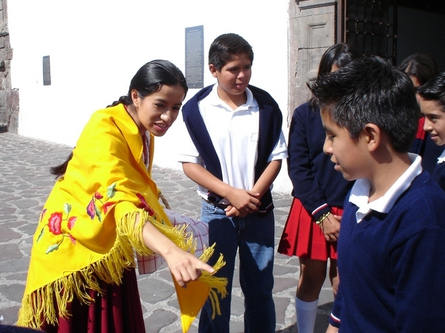 El personaje popular de la Panadera, recreado por Quito Eterno, para los recorridos educativos denominados Rutas de Leyenda, realizados en el centro histórico de Quito.